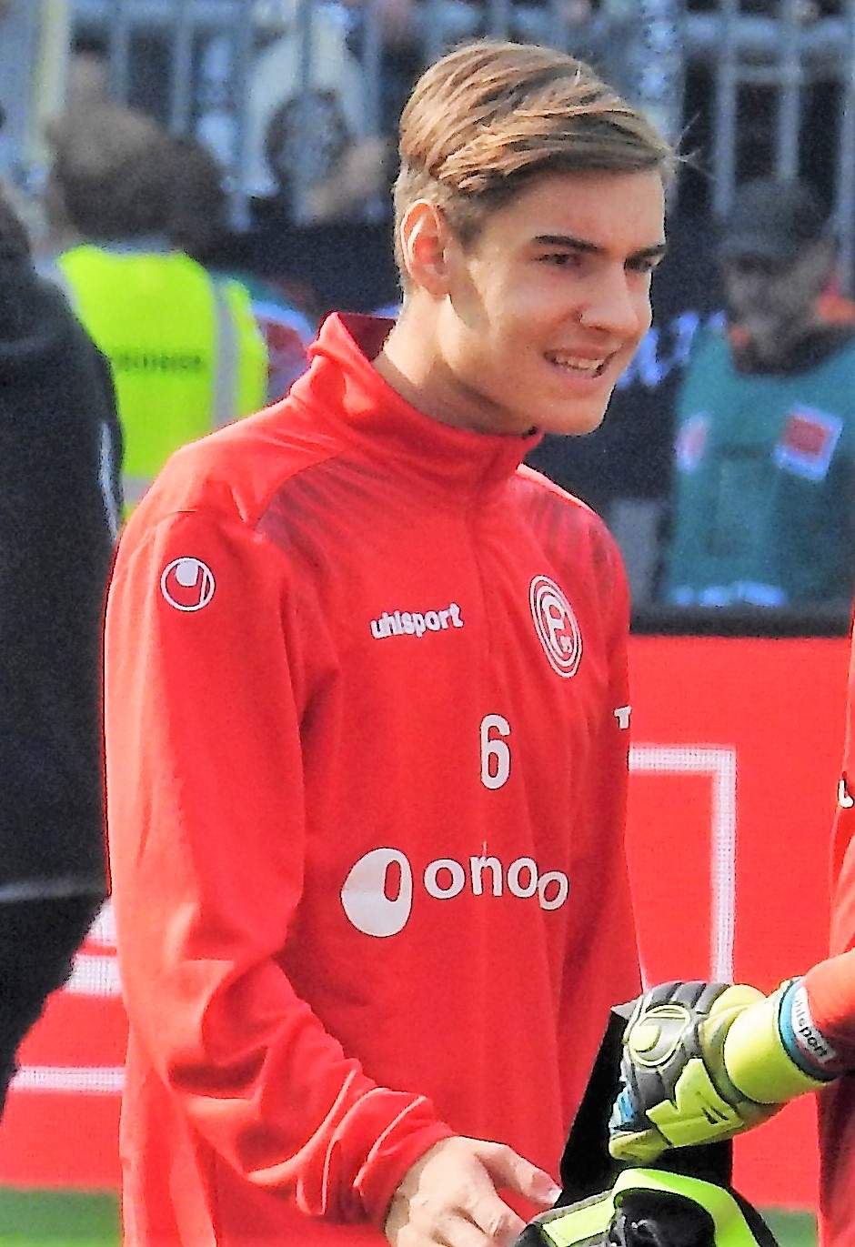 Neuhaus, Florian DÜS 17-18